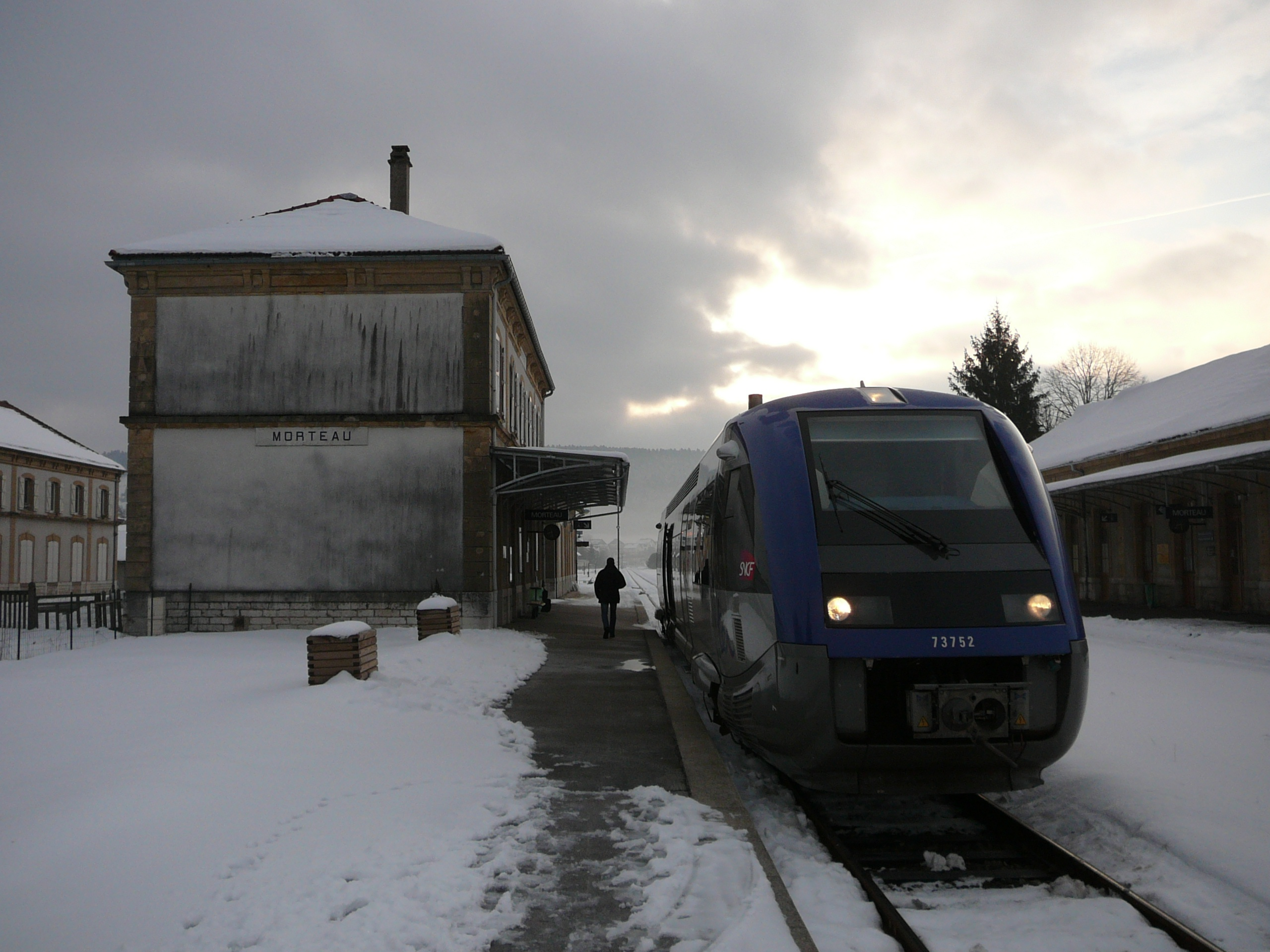 Gare SNCF de Morteau